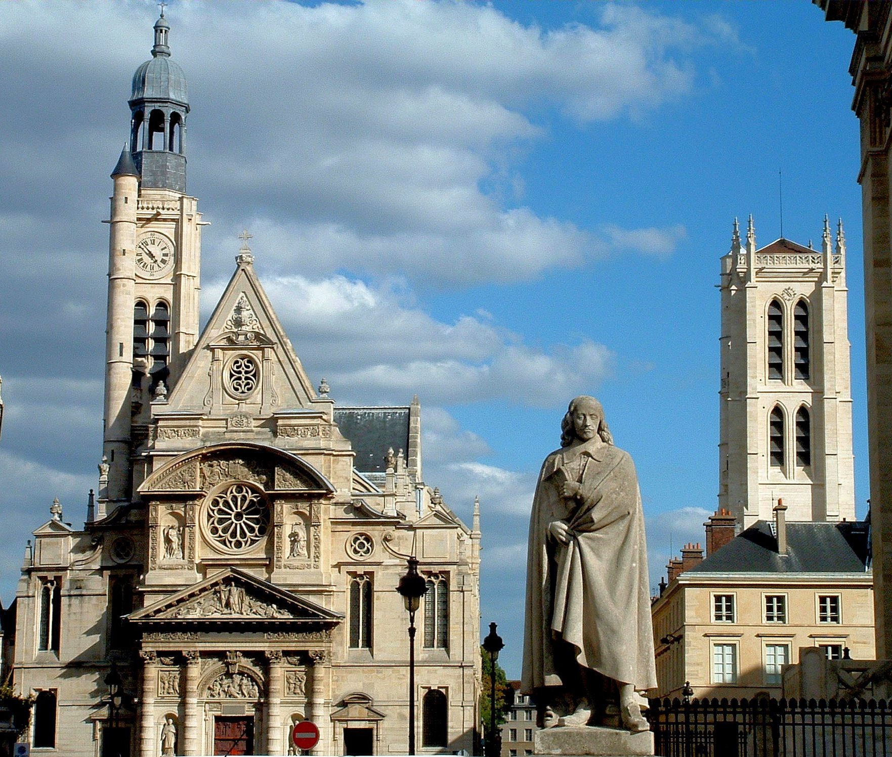 Paris 5ème arrondissement - Pascal, l'église Saint-Etienne-du-Mont et la tour de Clovis